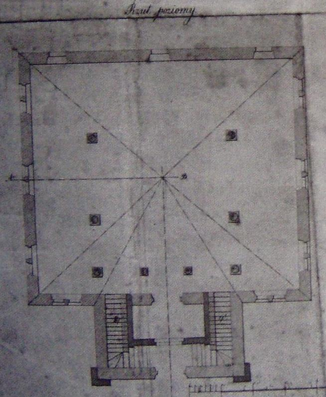 Projekt synagogi Tempel w Krakowie, 1860